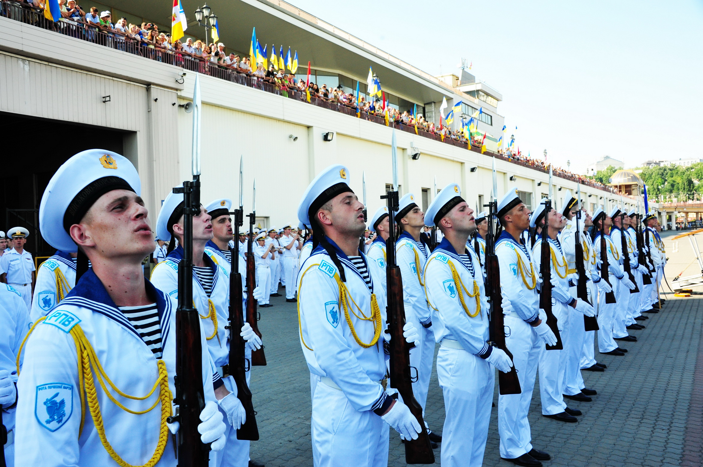 3 липня в Одесі відбулися урочистості з нагоди святкування Дня Військово-Морських Сил ЗС України Фото: Олександр Шепелєв